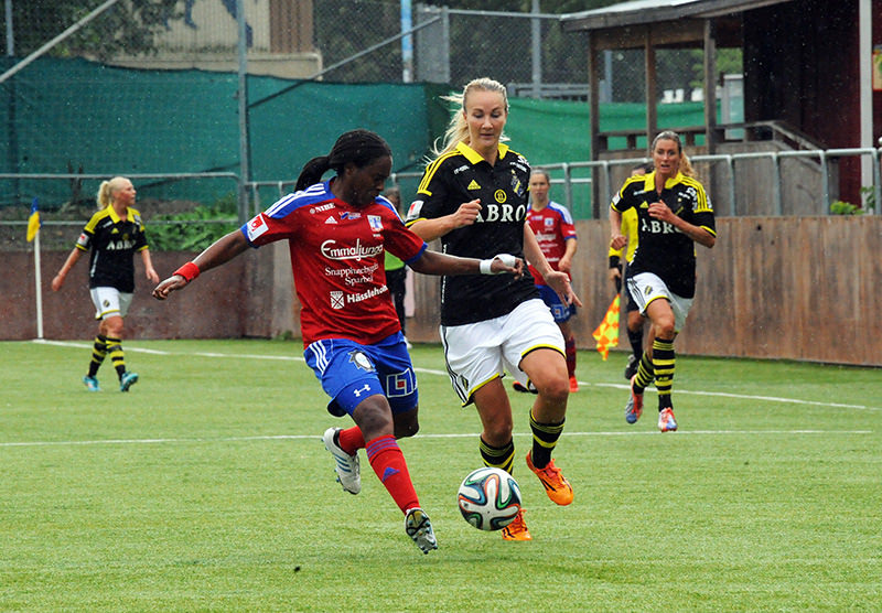 Ifeoma Dieke tackles Emma Lundh, Vittsjö v AIK, Damallsvenskan, August 2014